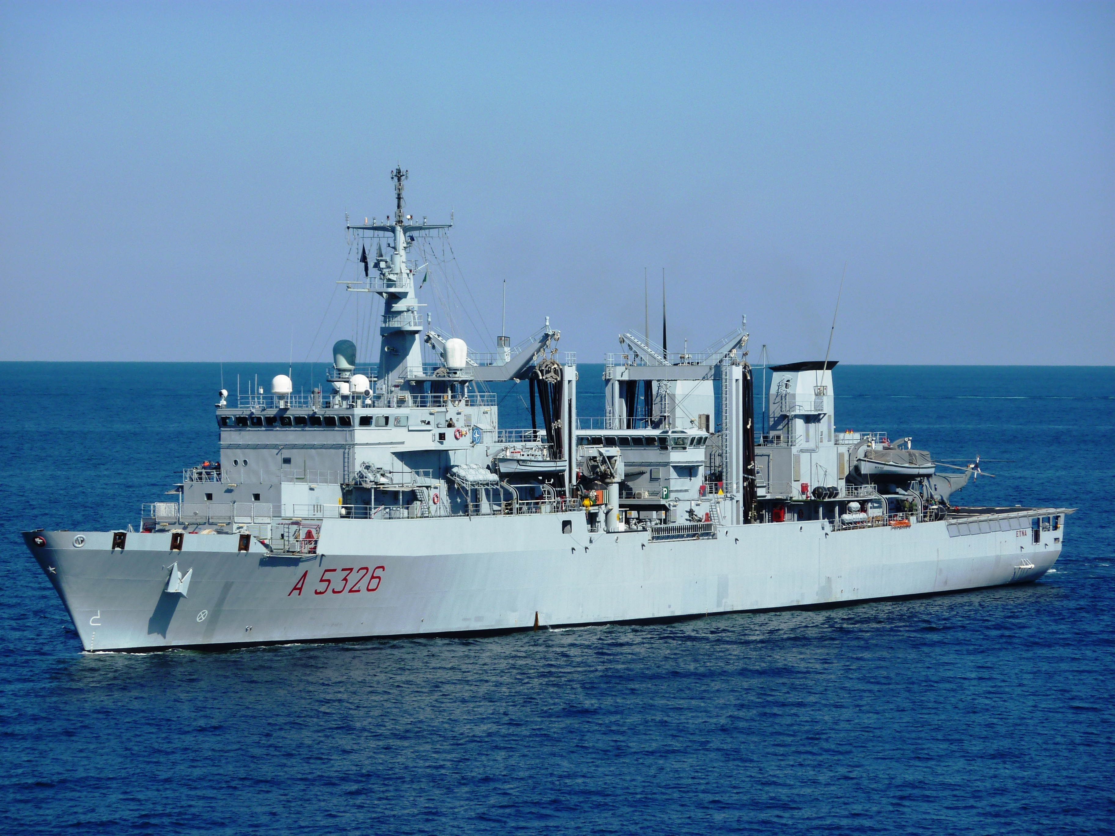 Nave Etna in navigazione nel Mar Mediterraneo